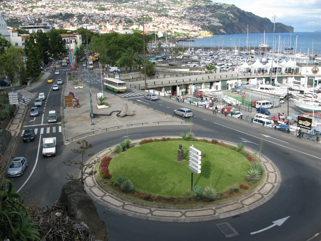 Funchal , Madeira 2008.